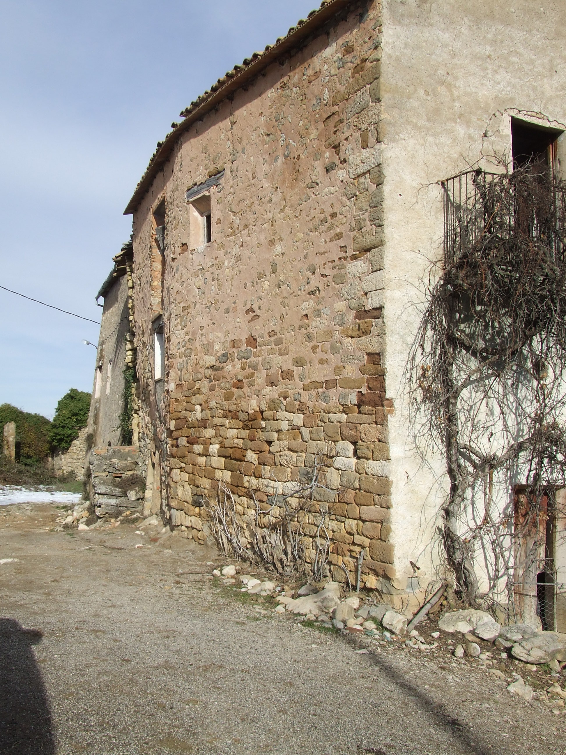 Paret romànica de Casa Ventureta, capella de Sant Joan Baptista (Perolet, Sant Salvador de Toló, Gavet de la Conca, Pallars Jussà)